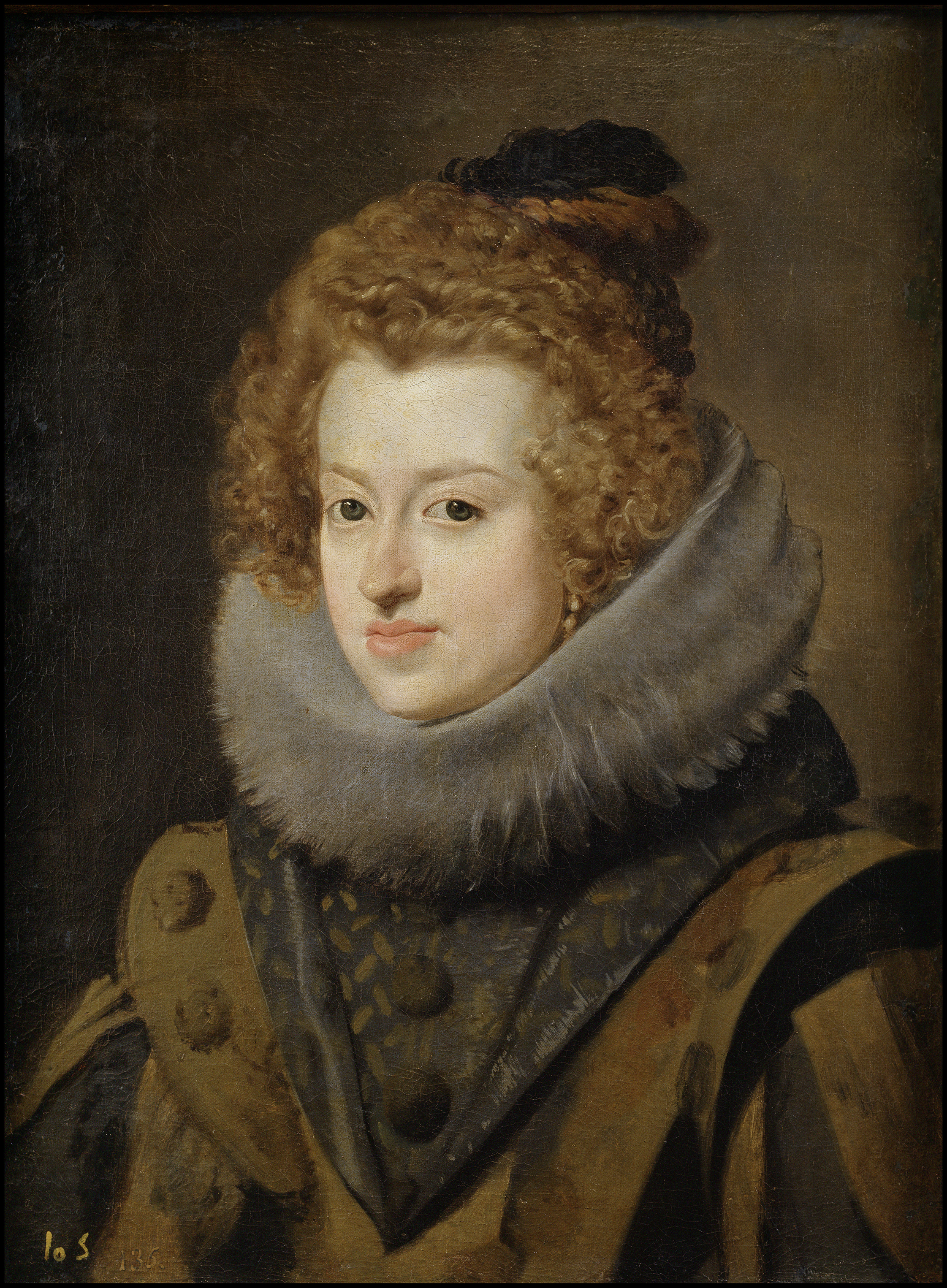 Retrato de la emperatriz María Ana de Austria (1606-1646), que fue hija del rey Felipe III de España y emperatriz consorte del Sacro Imperio Romano Germánico por su matrimonio con el emperador Fernando III de Habsburgo.